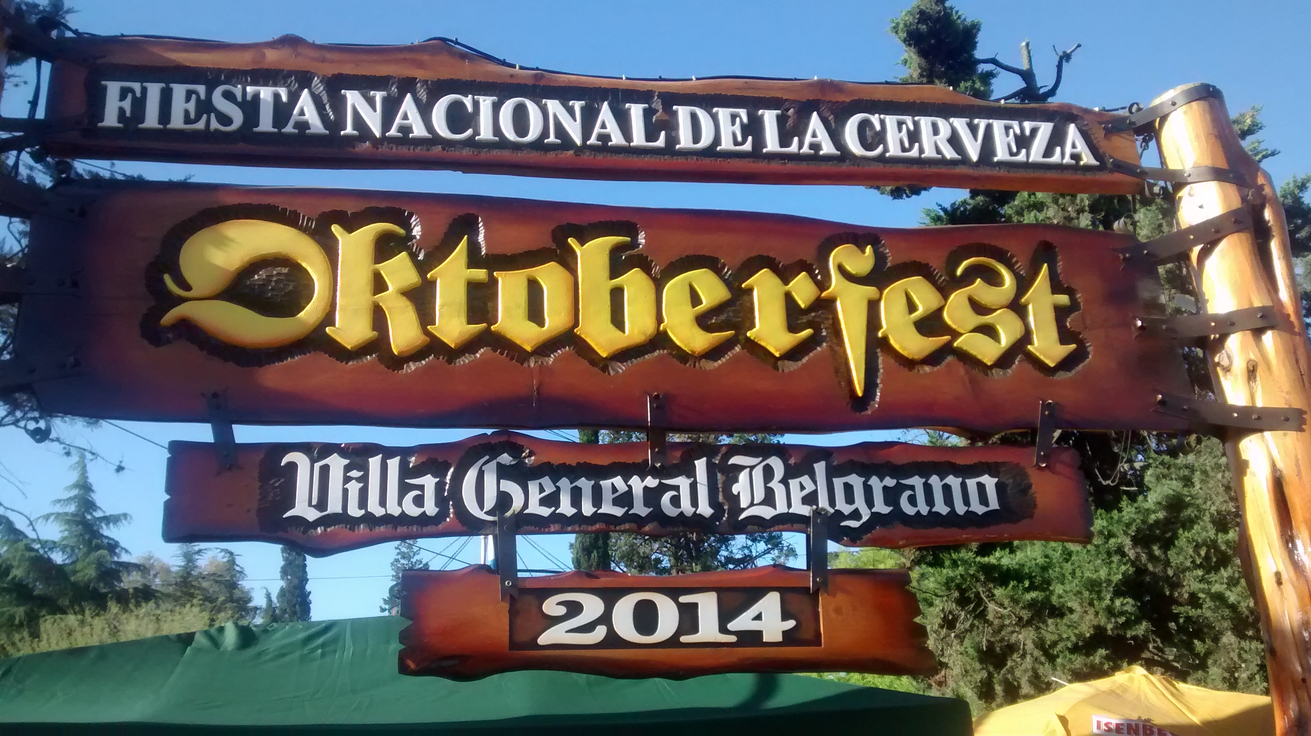 Cartel de entrada al Parque Cervecero en la Fiesta Nacional de la Cerveza 2014 en Villa General Belgrano